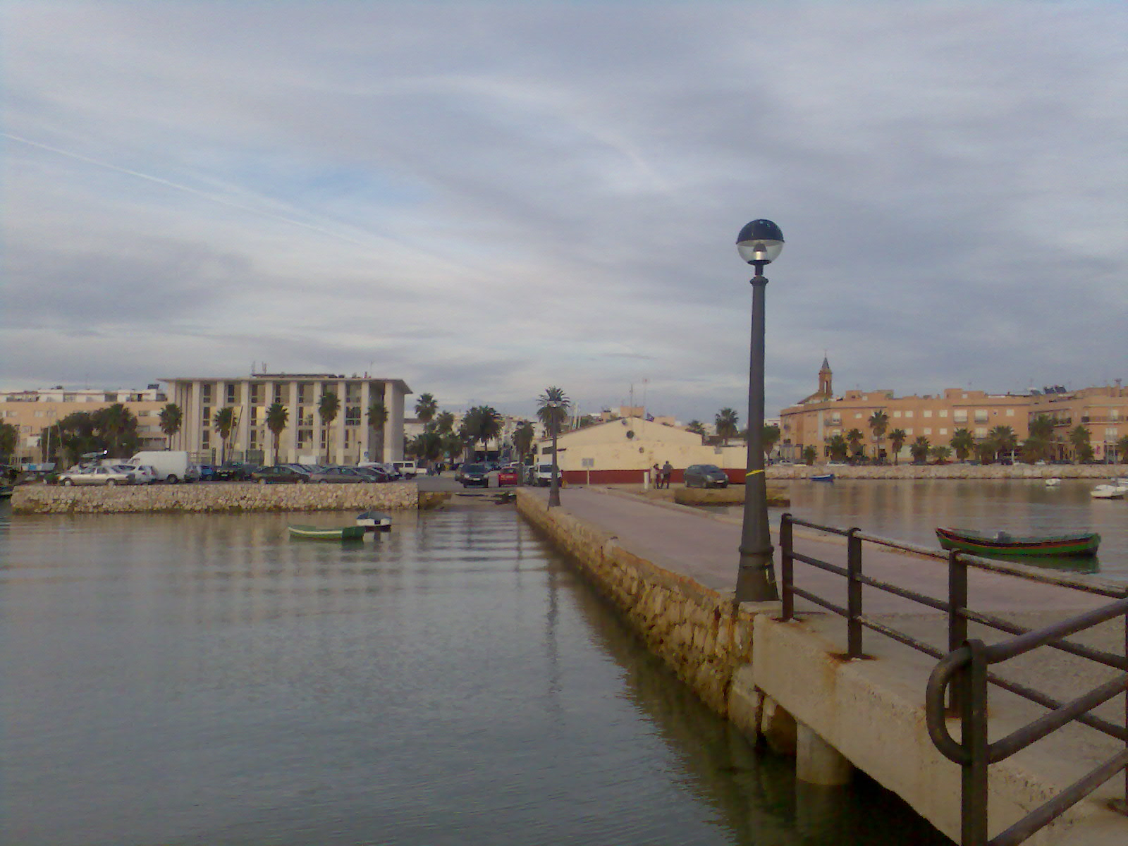 Vista de la Puntilla del Muelle, en Puerto Real, España